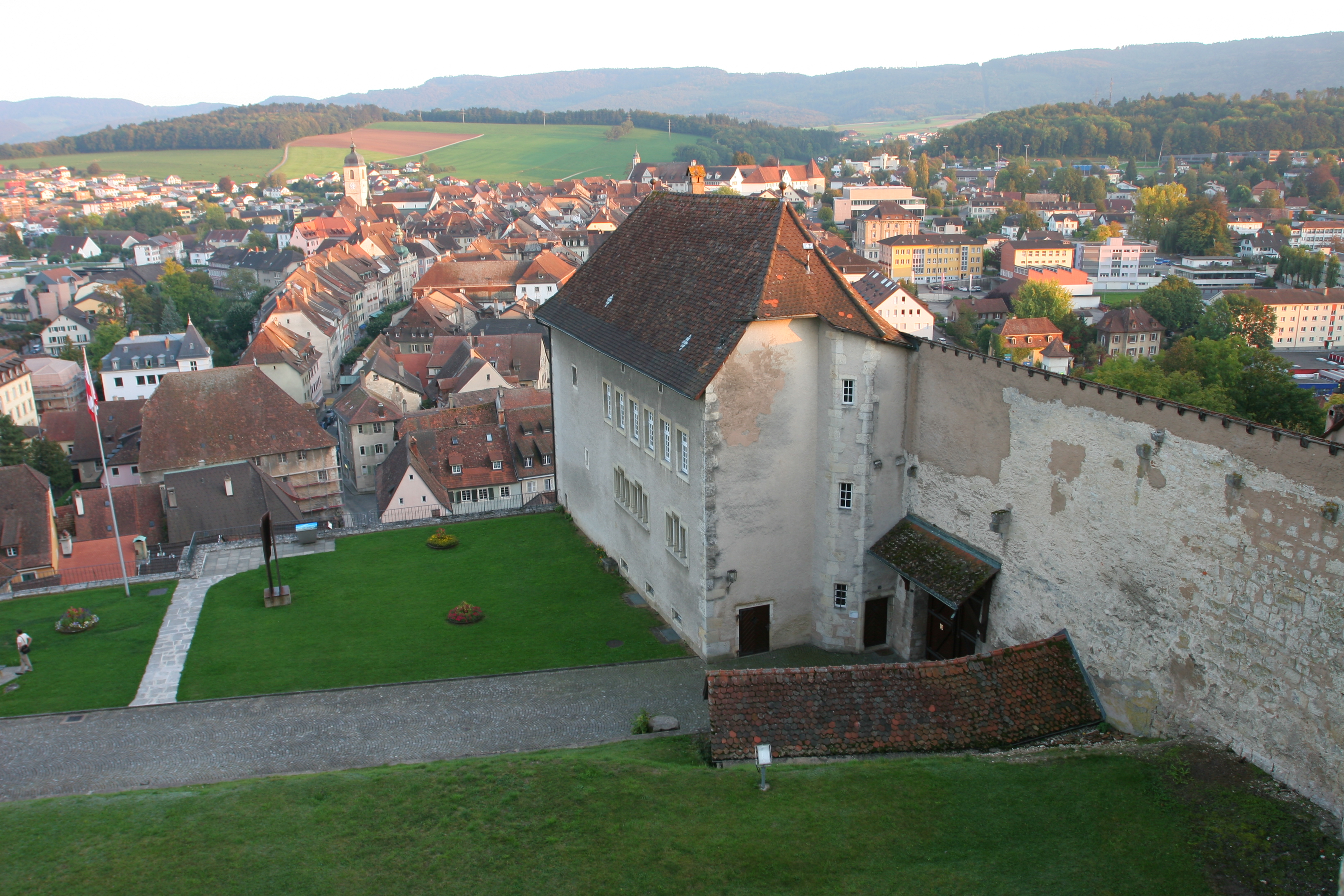 Château de Porrentruy et ville en arrière plan